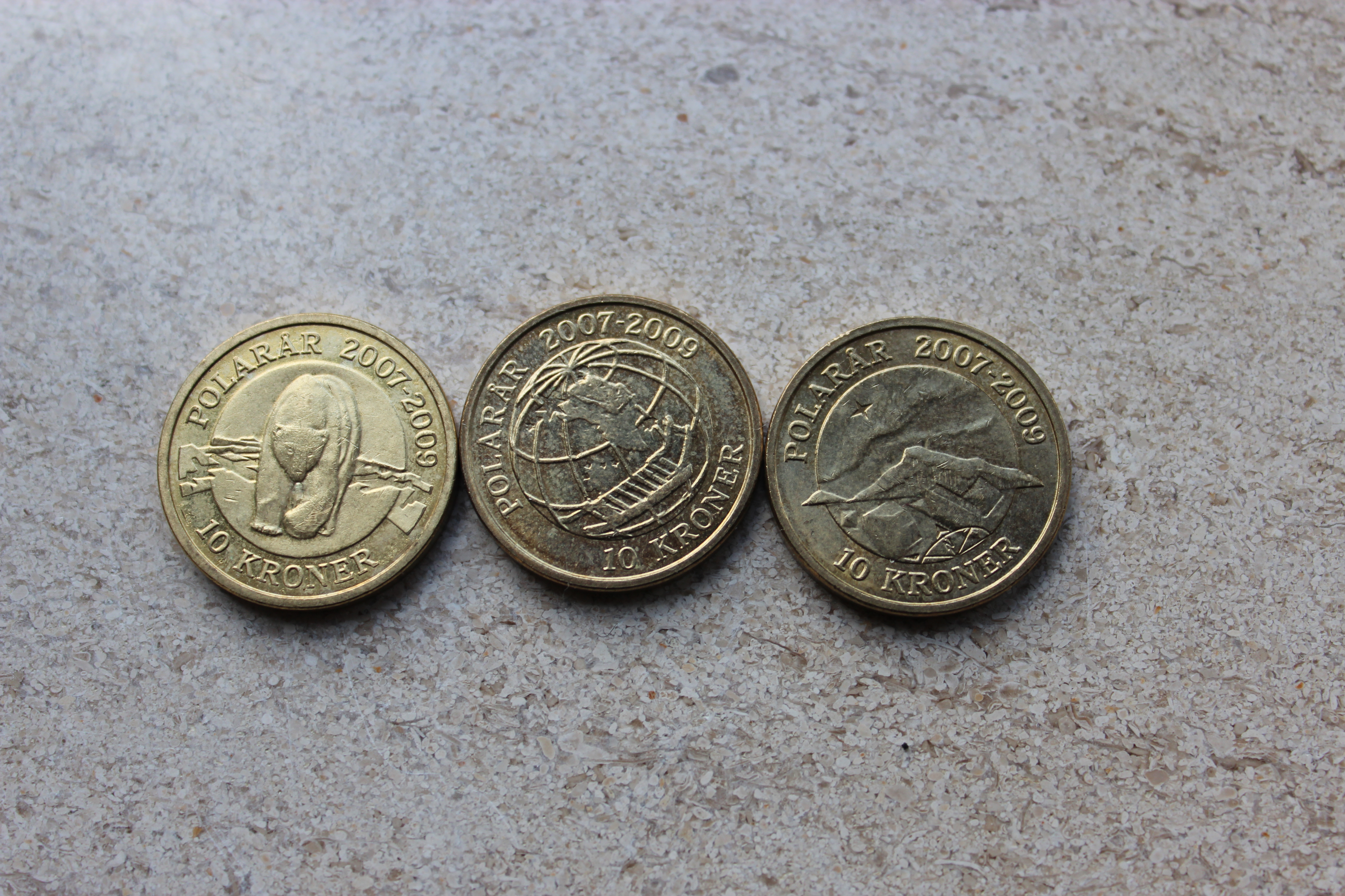 Danske 10-kroner. Polarmønterne; Isbjørn (2007), Slædepatruljen Sirius (2008) og Nordlys (2009)